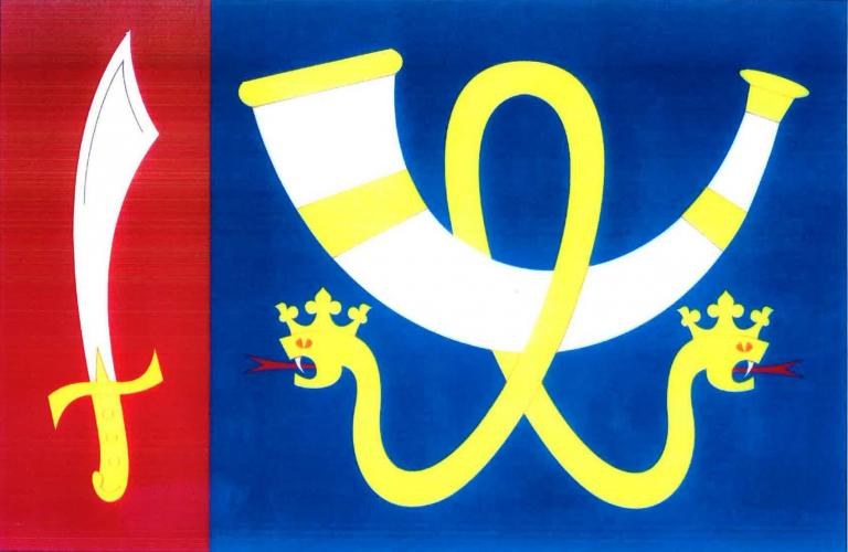 vlajka, Hospozín, okres Kladno